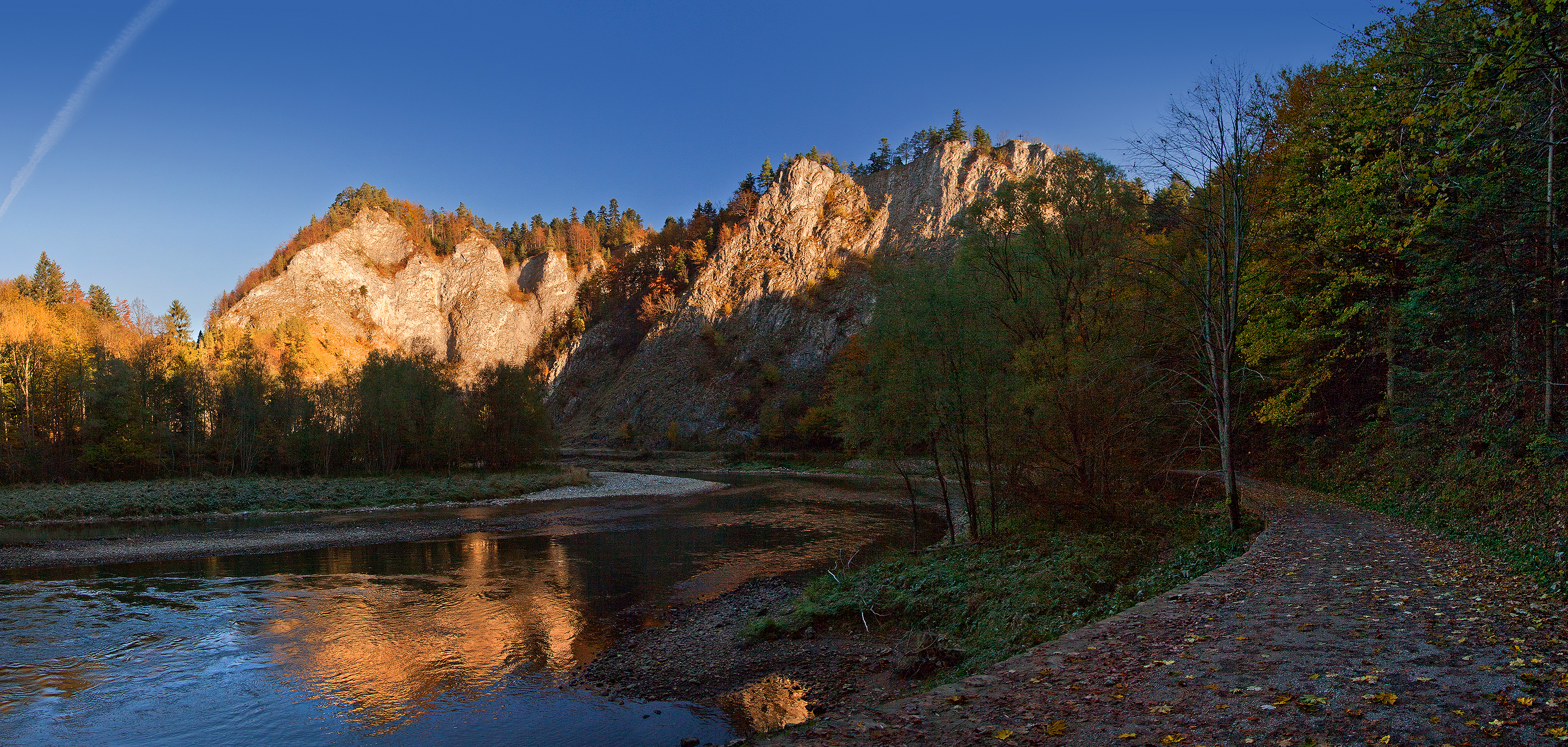 Jesień nad Dunajcem. This is a photography of Natura 2000 protected area with ID PLB120008